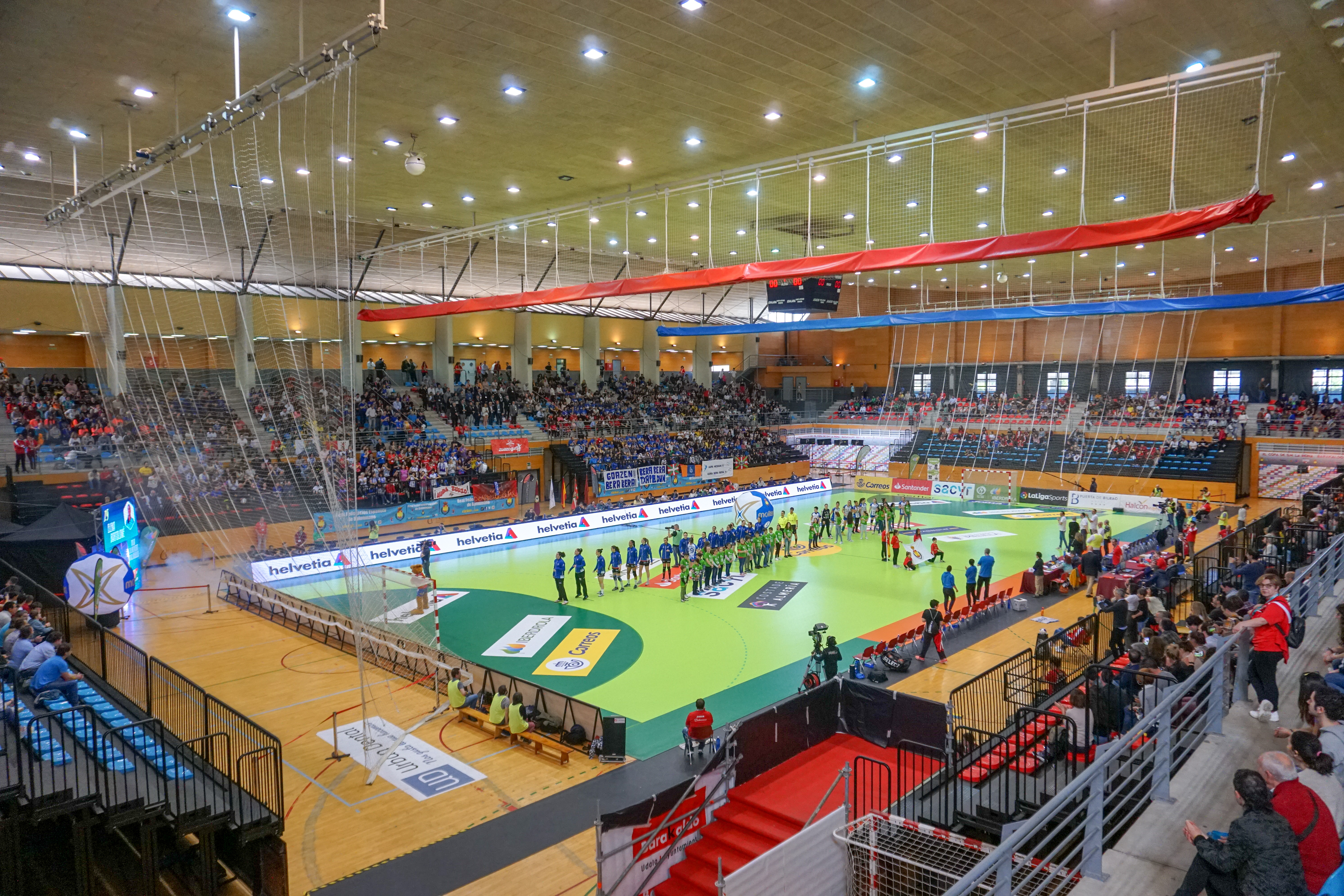 Final de la Copa de la Reina de Balonmano 2018-19